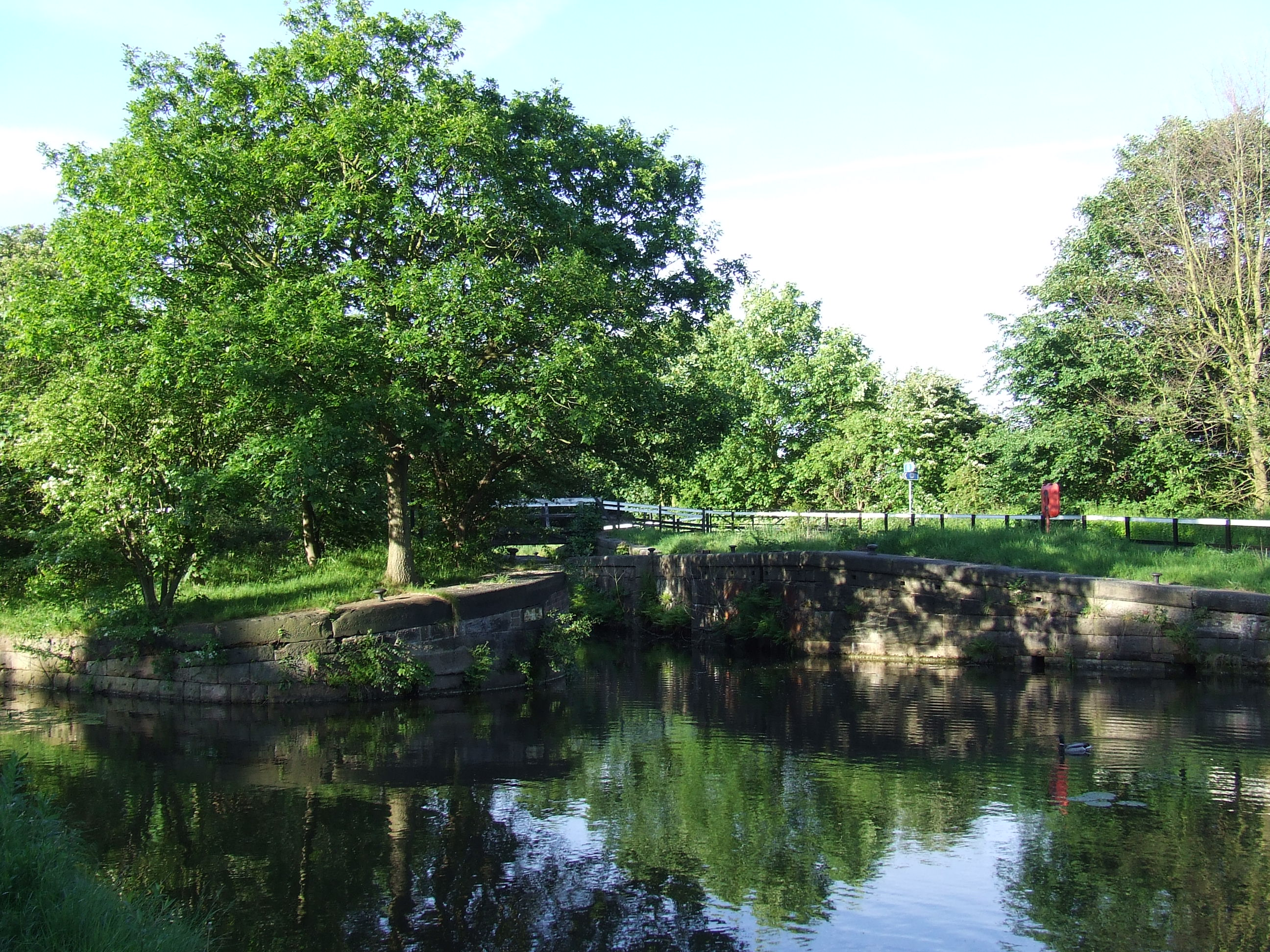 Sankey Valley Park May 2007